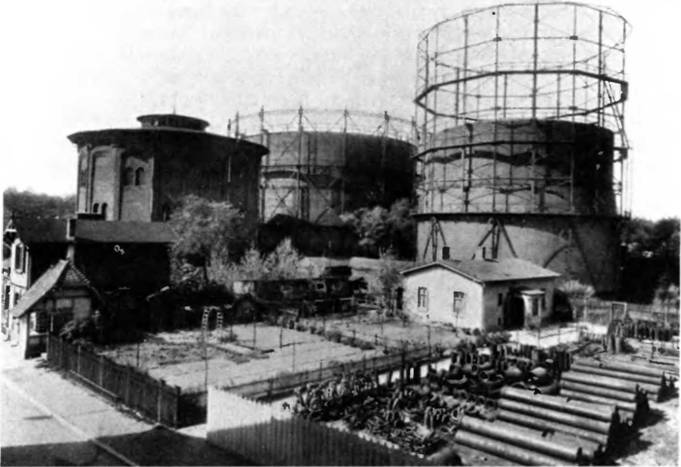 Zbiorniki gazu (rozebrane w 1973 r.) w gazowni bydgoskiej